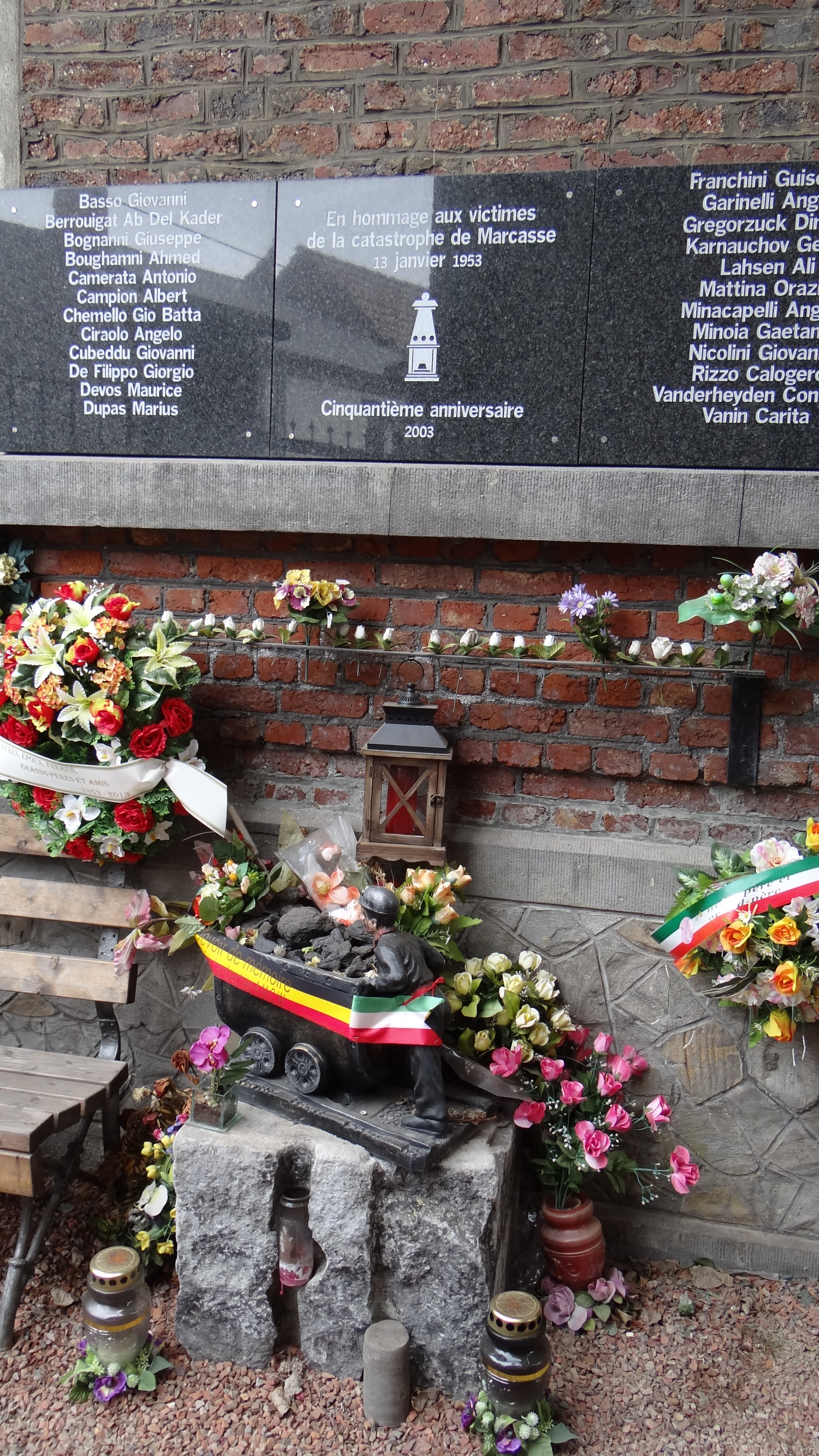 Wasmes - Charbonnage de Marcasse - Hommage aux tués du coup de grisou de 1953